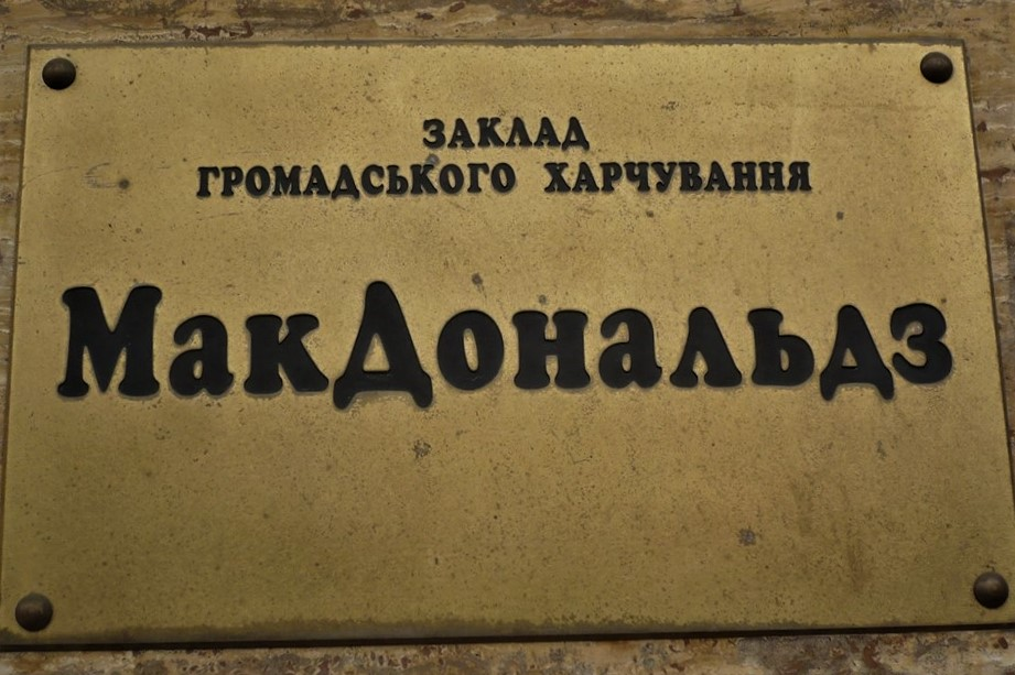 McDonalds we Lwowie